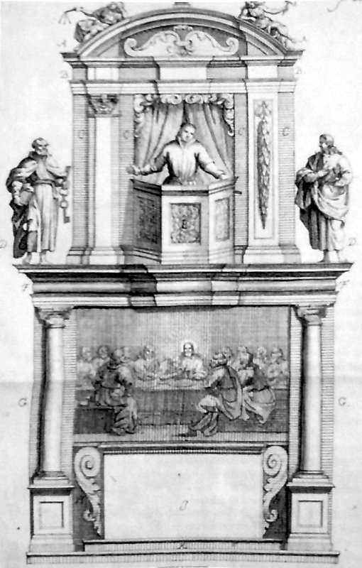 Entwurf eines Altars von Senckeisen, der dem der Marienkirche in Leipzig-Stötteritz ähnelt